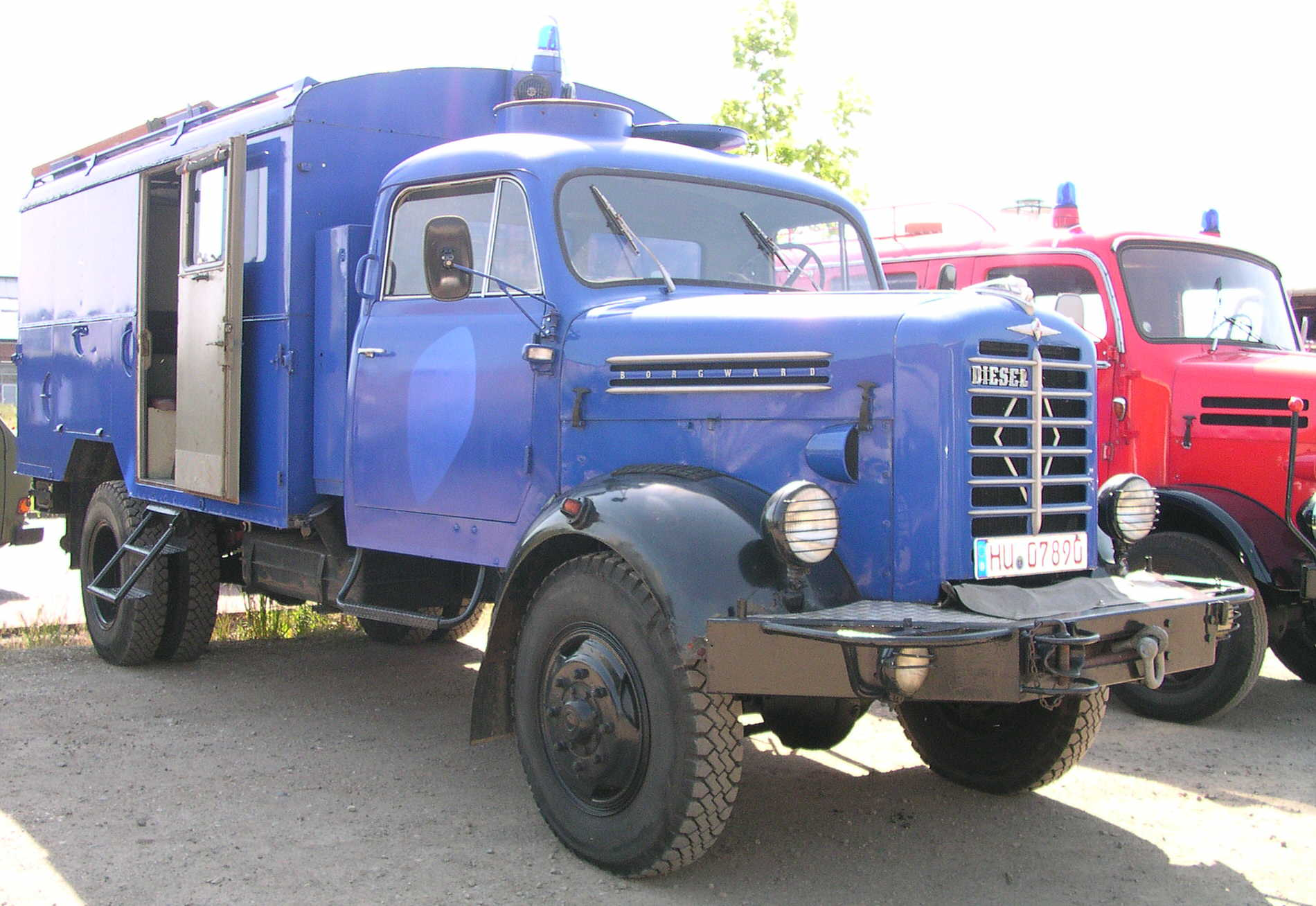 Willich, Borgward-Treffen im LKW-Museum, ehemaliger Borgward B555A-THW-LKW